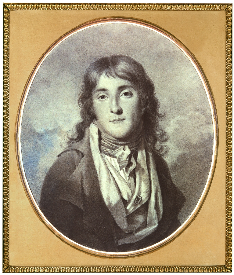 Honorius IV van Monaco (1758-1819)